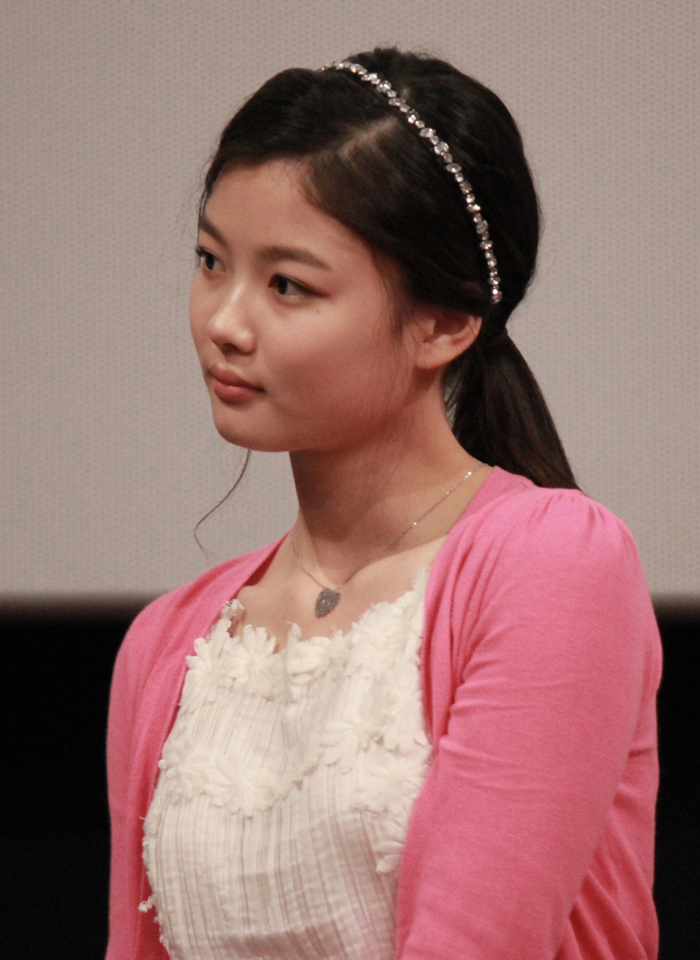 140322 우아한 거짓말 부산 무대인사